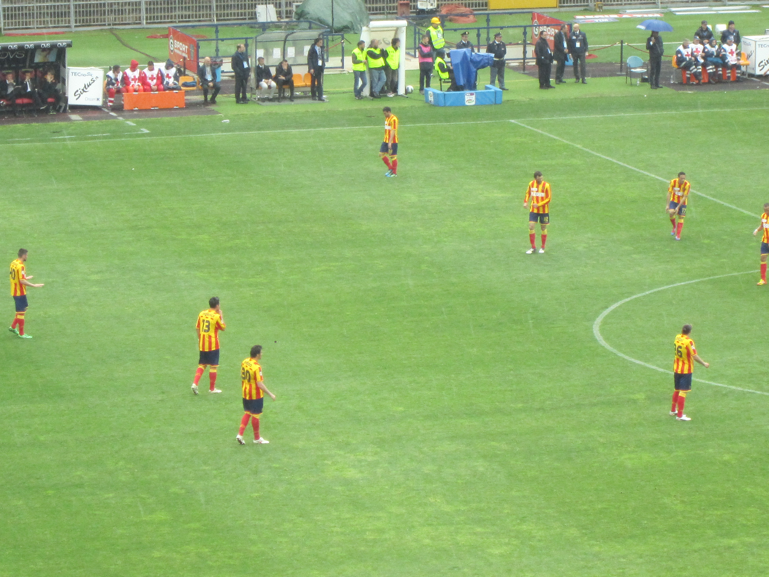 U.S. Lecce - A.S. Roma 4 - 2, Stadio Via del Mare, April 7th, 2012